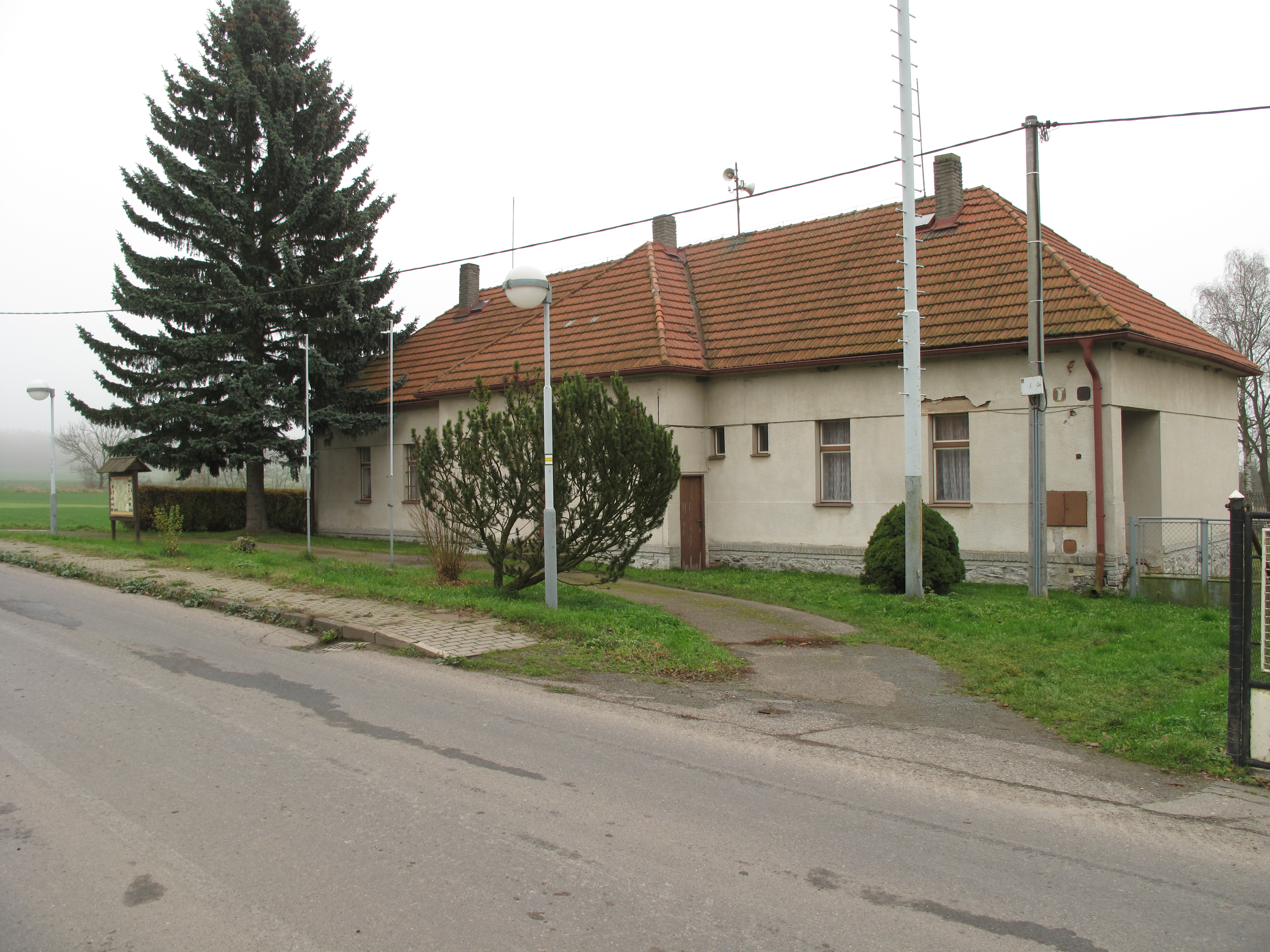 Obecní úřad v Novém Domě. Okres Rakovník, Česká republika.